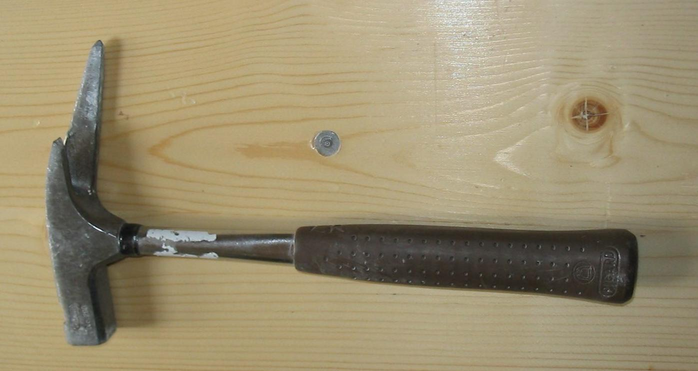 Latthammer Typ Nr. 298 von Picard, Wuppertal-Cronenberg, nach monatelangem Gebrauch bei Baufritz. Am Griff sind L und R eingeschnitzt, damit es keine Verwechslung gibt (L = Nachname, R = Roland)